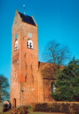 Tolbert (foto Fransvannes febr 03)